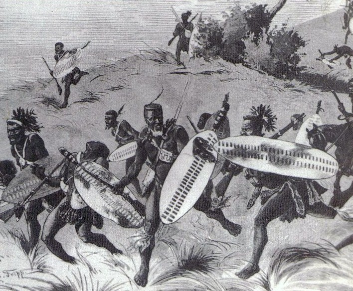 Guerriers zoulous, gravure de 1879